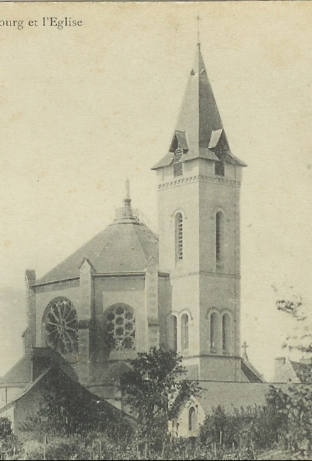 Nouvelle église (1895) de Brain-sur-Longuenée (49).